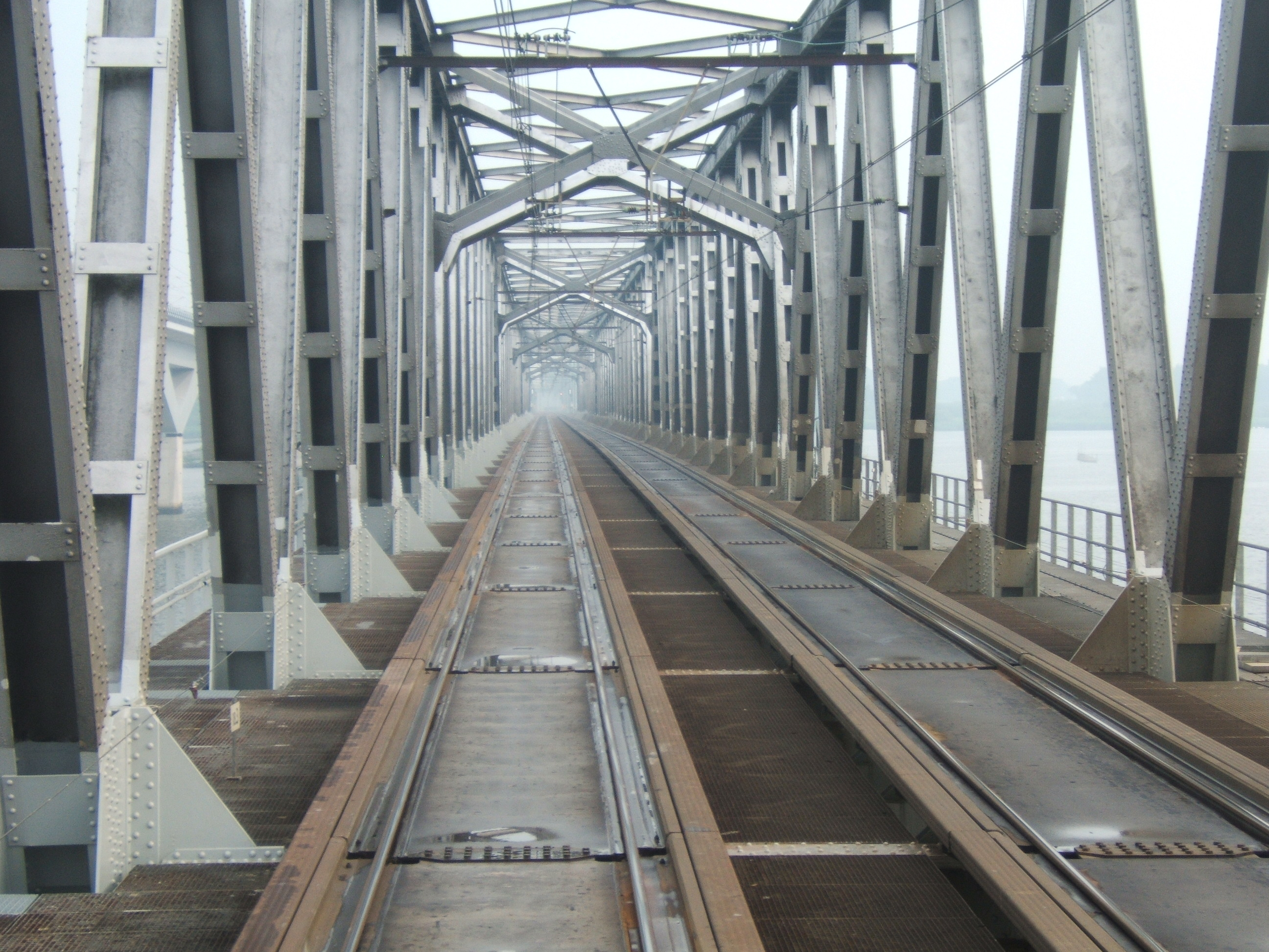 Moerdijkbrug genomen vanaf achterkant trein.